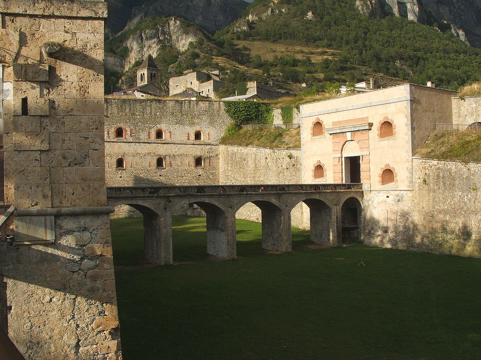 Valle Stura di Demonte - Immagine da Vinadio